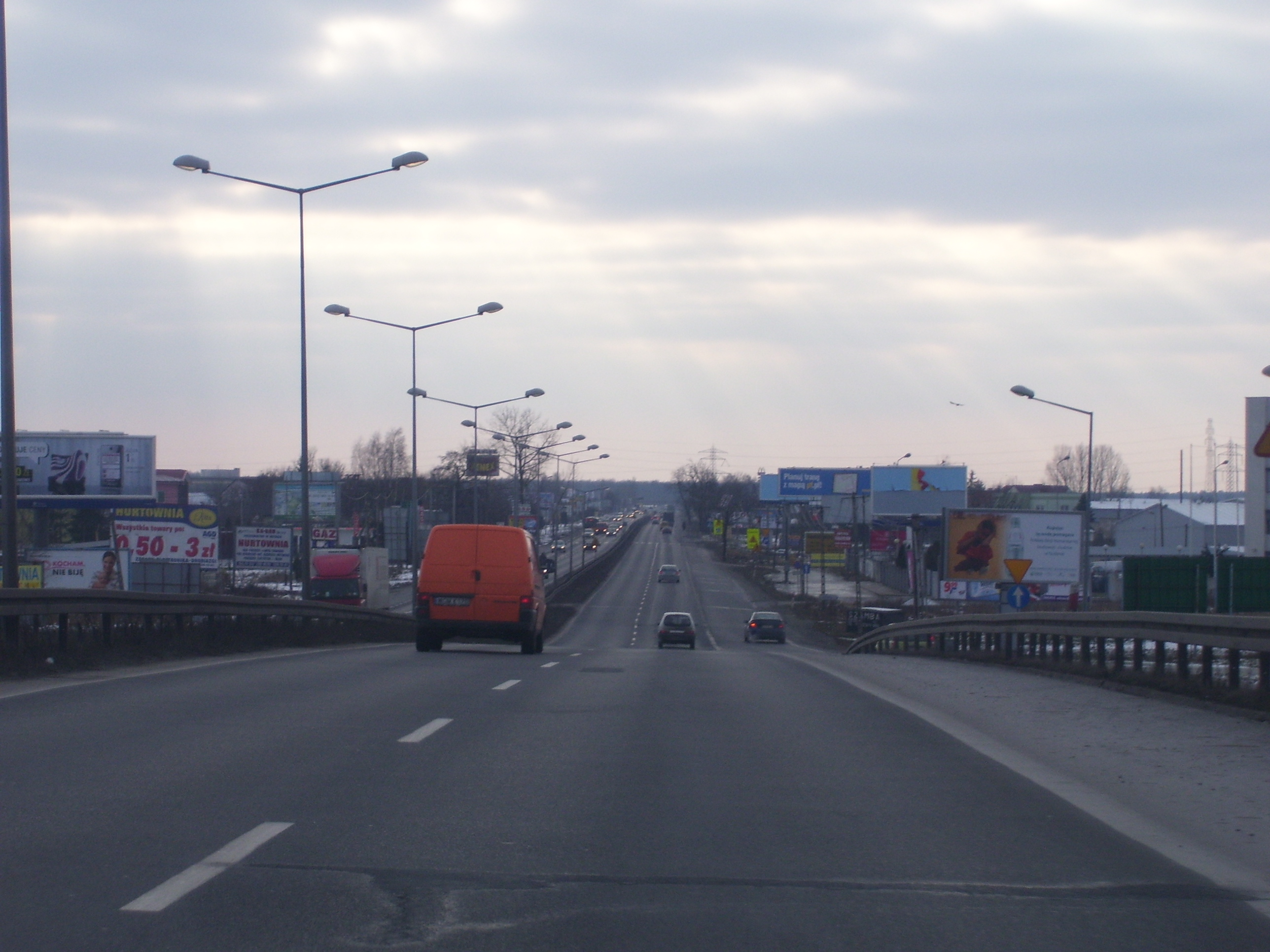 DK8 w Jankach